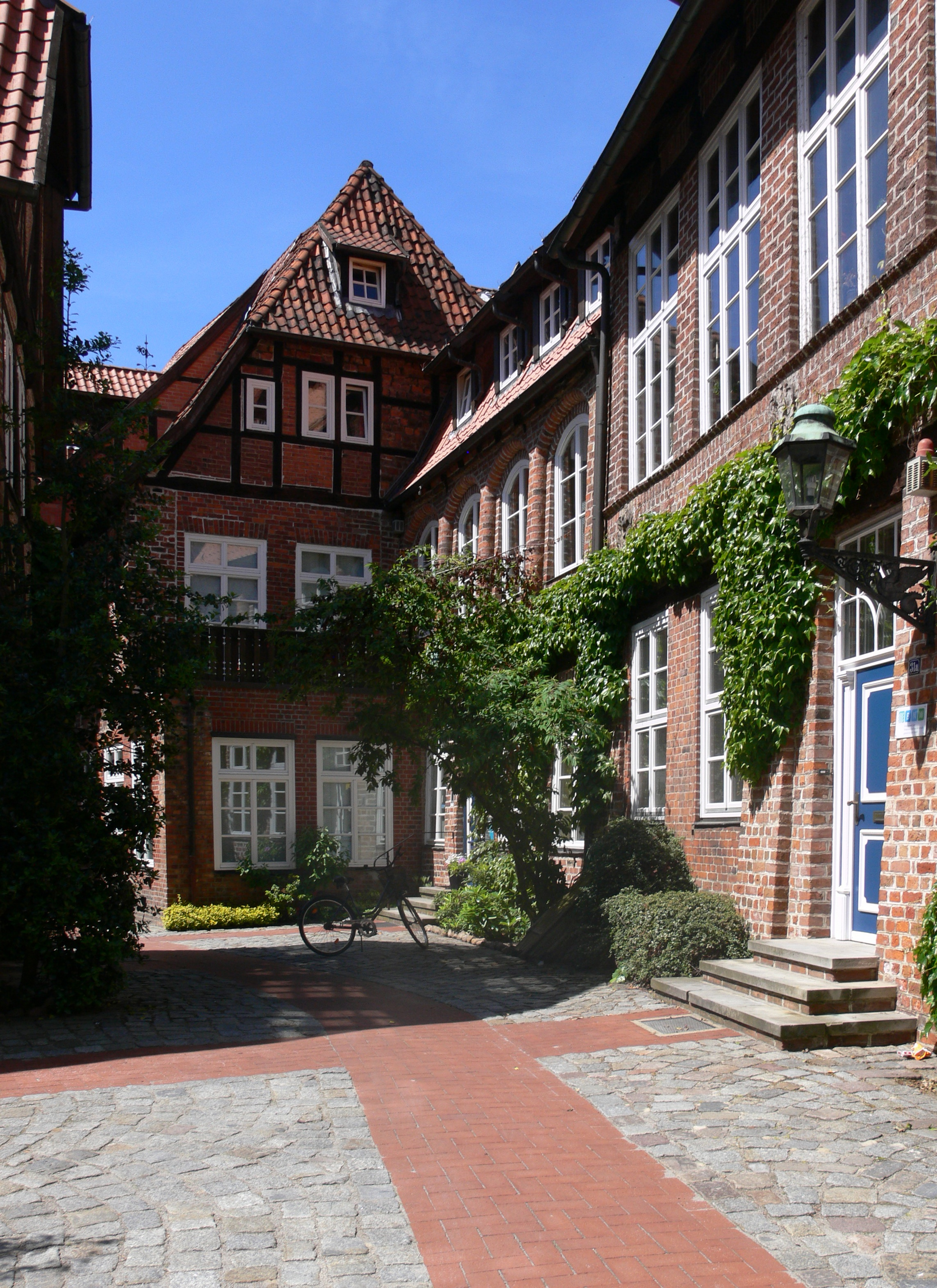 Lüneburg, Am Sande 31, Hinterhäuser (frühere von Stern'sche Druckerei)